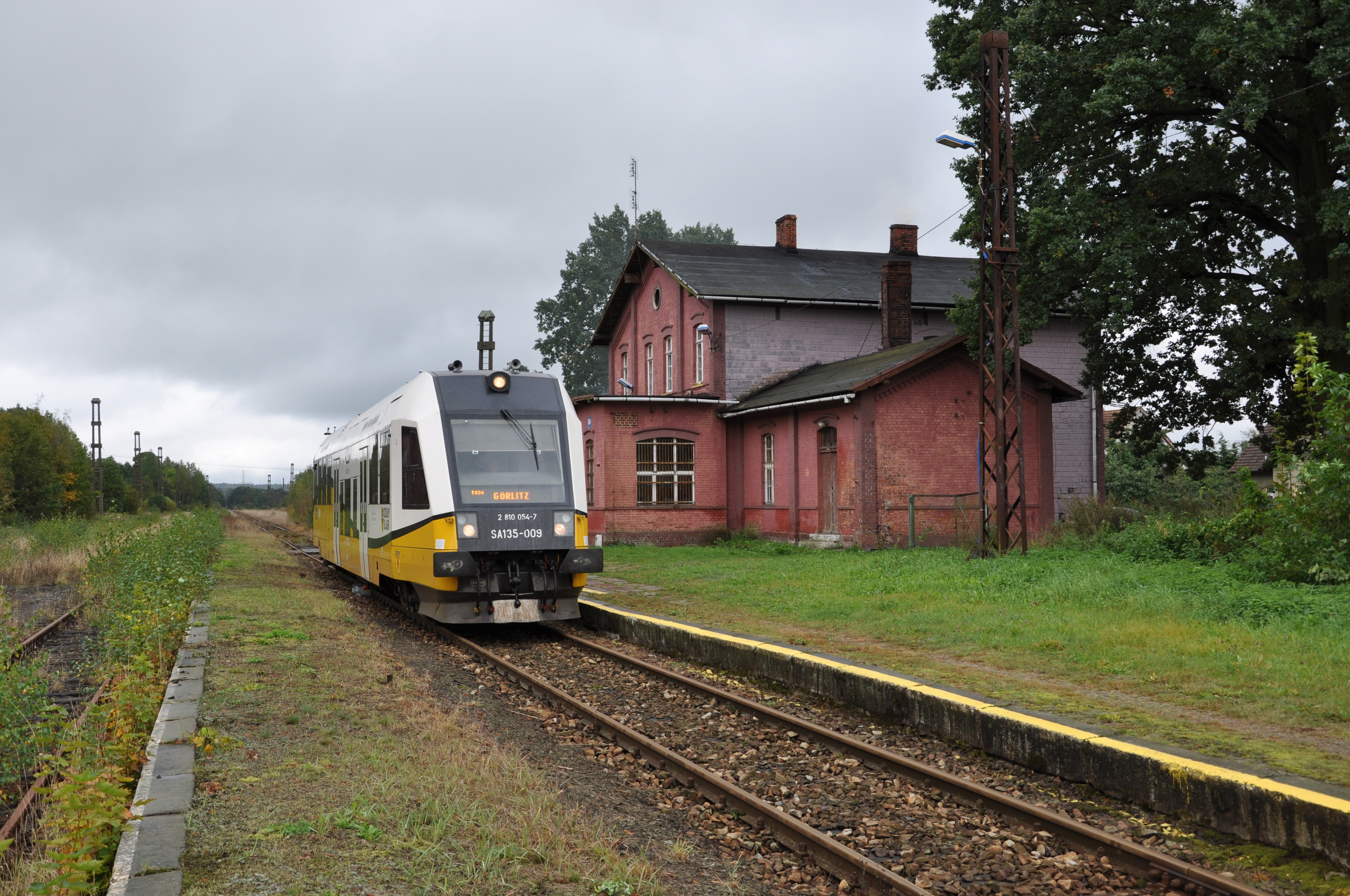 Reisezug der Koleje Dolnośląskie im Bahnhof Mikułowa (Nikolausdorf) der Bahnstrecke Wrocław Świebodzki–Zgorzelec